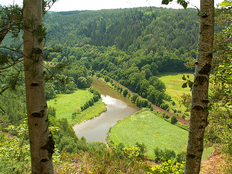 Das Elstertal oberhalb vom Wünschendorfer Märchenwald